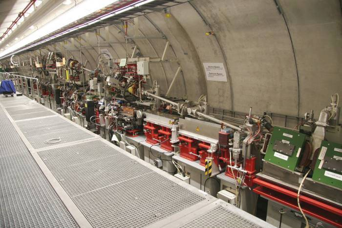 Freie Elektronen Laser FLASH am DESY in Hamburg; Flugbahn der Teilchen kann an dieser Stelle wie bei einer Weiche umgelenkt werden; unten werden die Teilchen durch einen Undulator geschickt; oben umgehen die Teilchen den Undulator. Veröffentlichung mit freundlicher Genehmigung DESY, Hamburg.